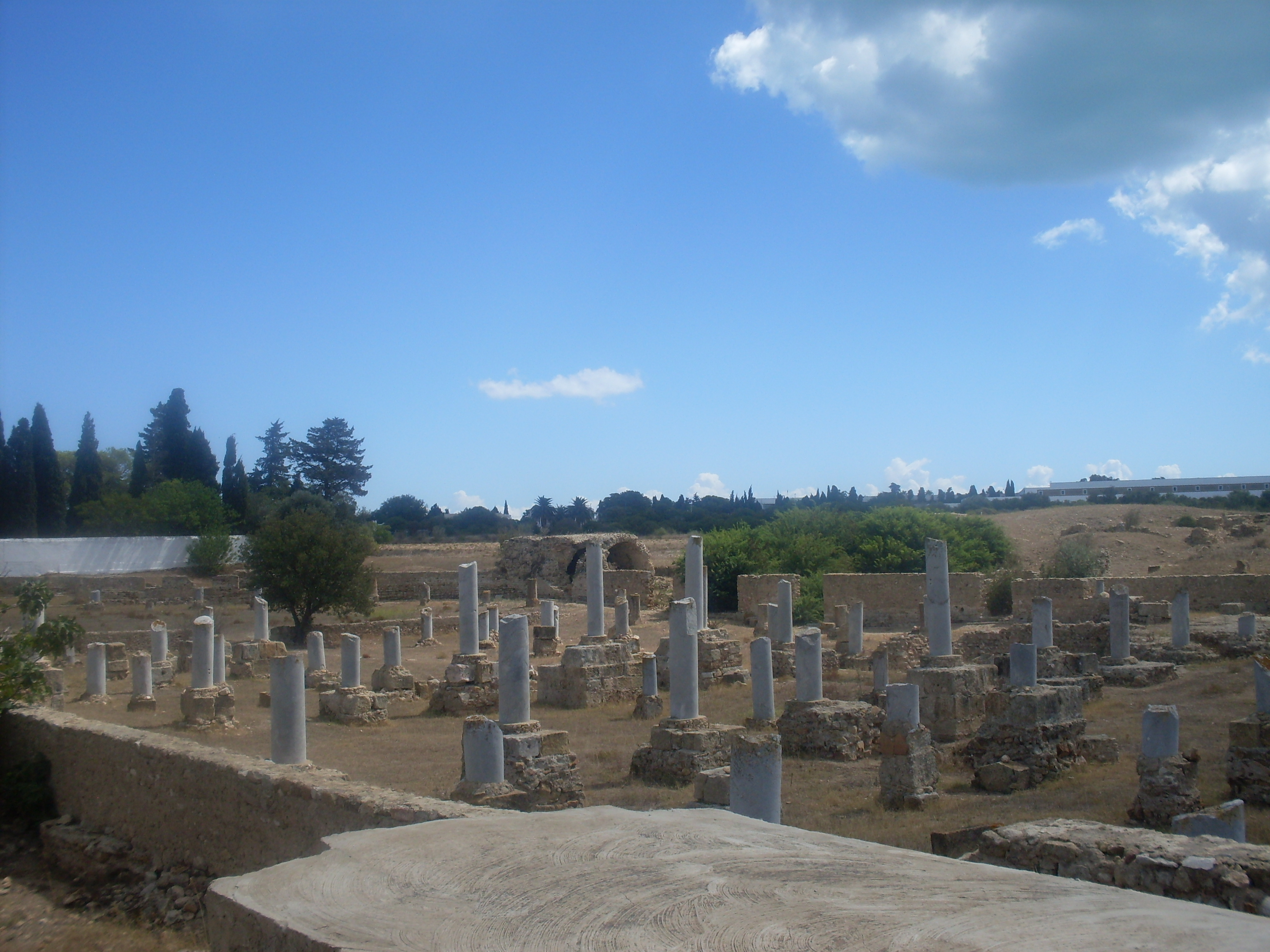 Tunisie, Carthage, Basilique Damour el Karita